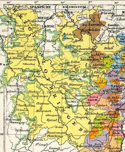 Duché de Lorraine (1618-1648).